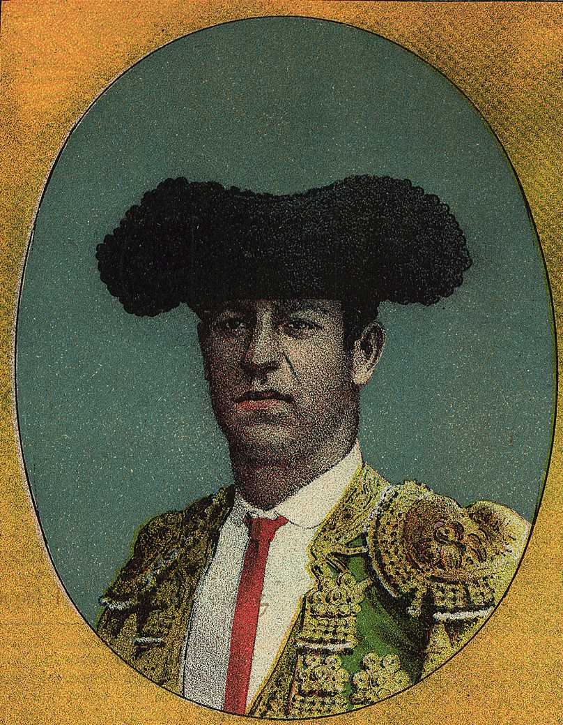 Cogida del Jerezano en Jerez de la Frontera.